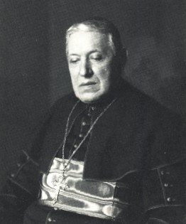 Porträtfoto des Kardinals Mariano Rampolla, Marchese del Tindaro.